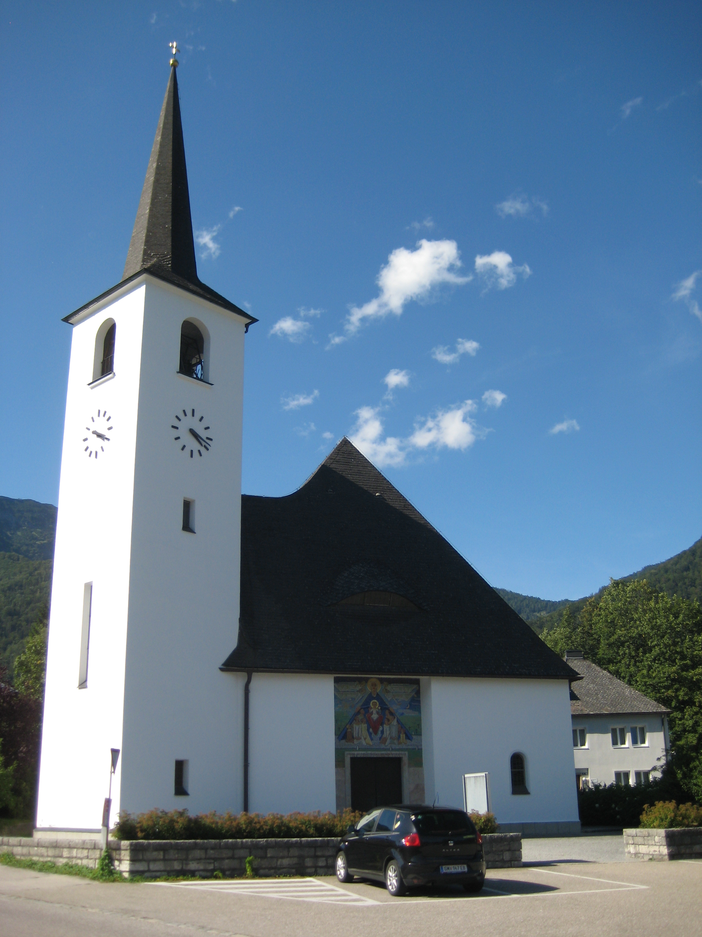 Kath. Pfarrkirche, Wallfahrtskirche, ""Maria an der Straße"" und Pfarrhof